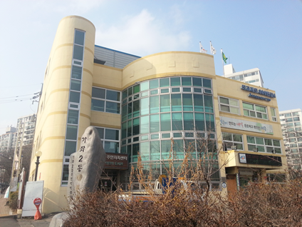 가좌2동 주민센터